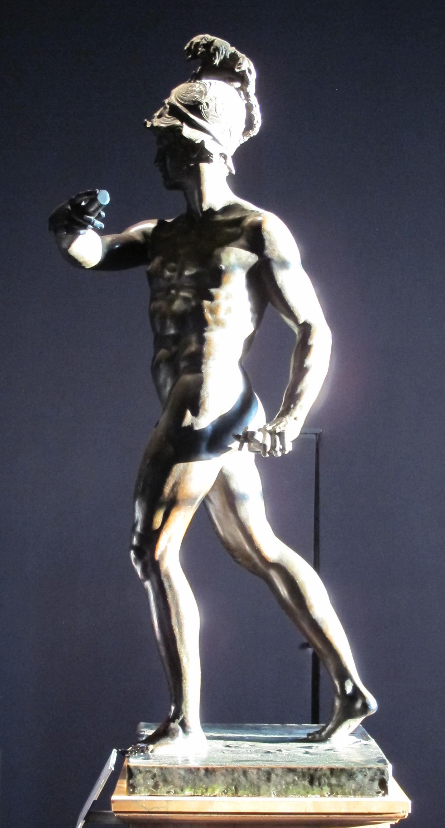 Bartolomeo ammannati, marte gradivo